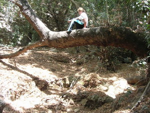 נחל בצת בלי זרימה